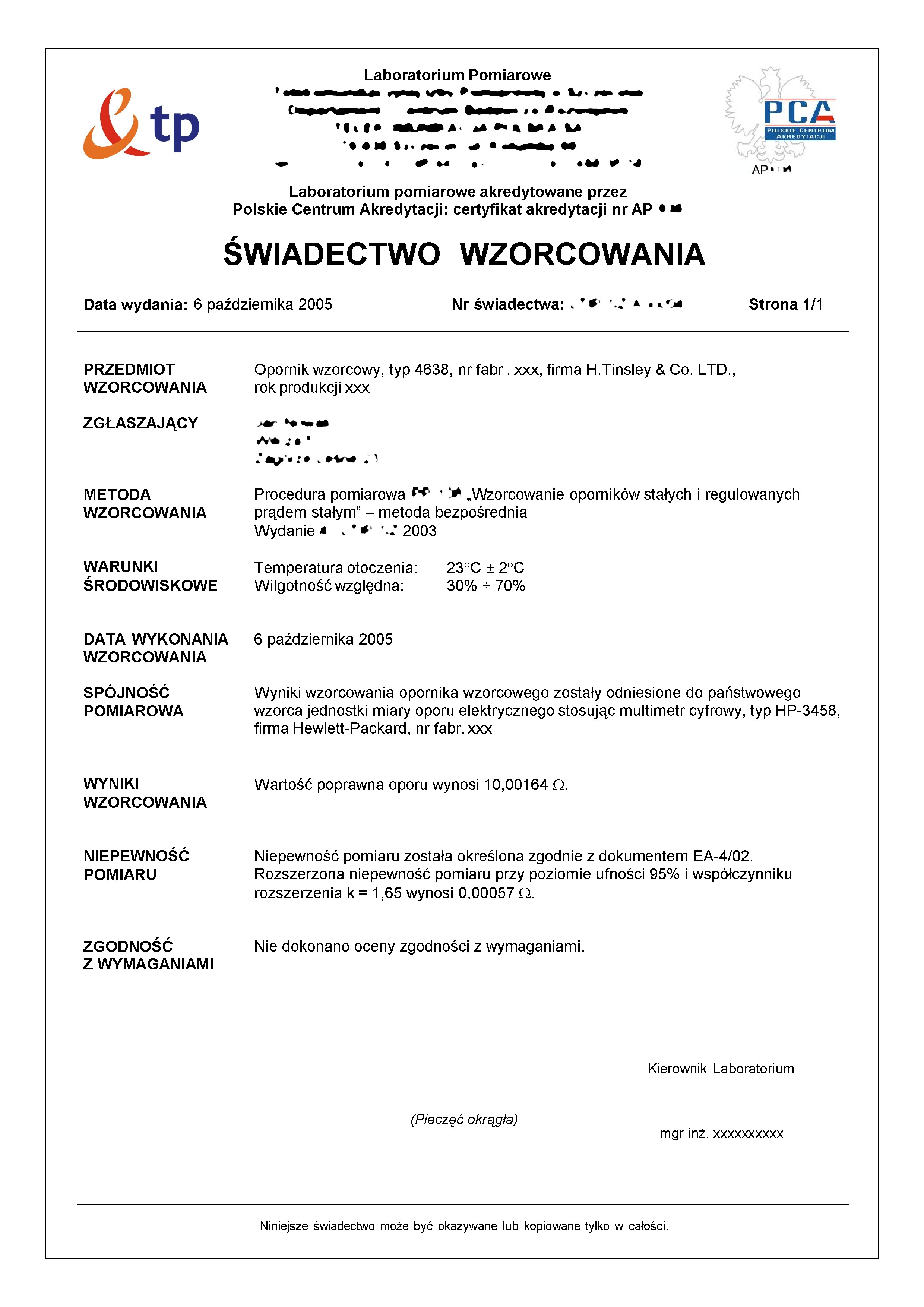 Przykład Świadectwa Wzorcowania wydanego przez laboratorium pomiarowe akredytowane przez Polskie Centrum Akredytacji (PCA). Autor: Electron, stworzone dla pl.wikipedia w październiku 2005